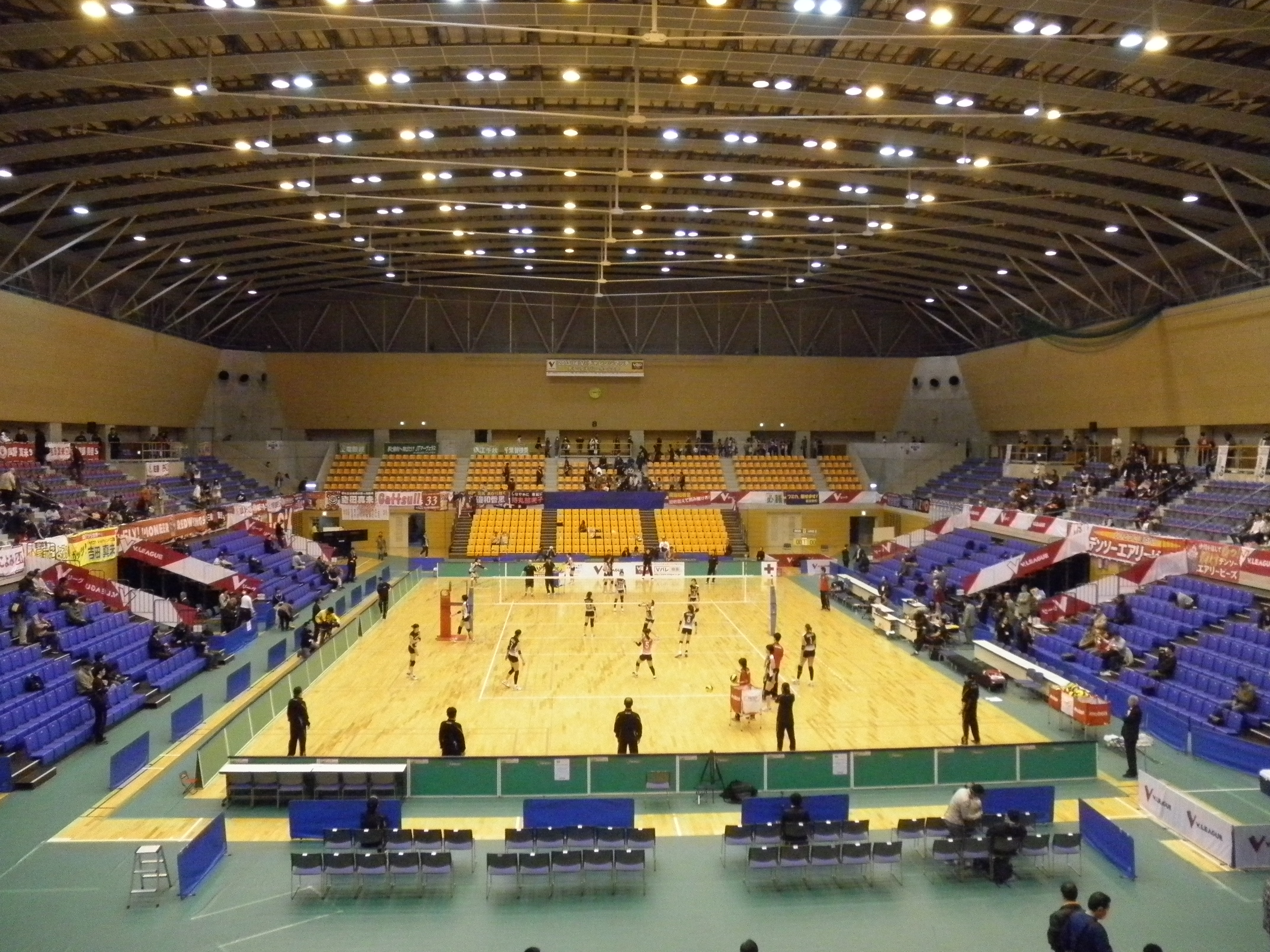 さいたま市記念総合体育館のアリーナ